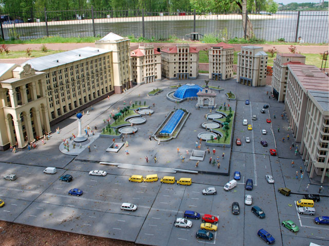 Парк «Киев в миниатюре»